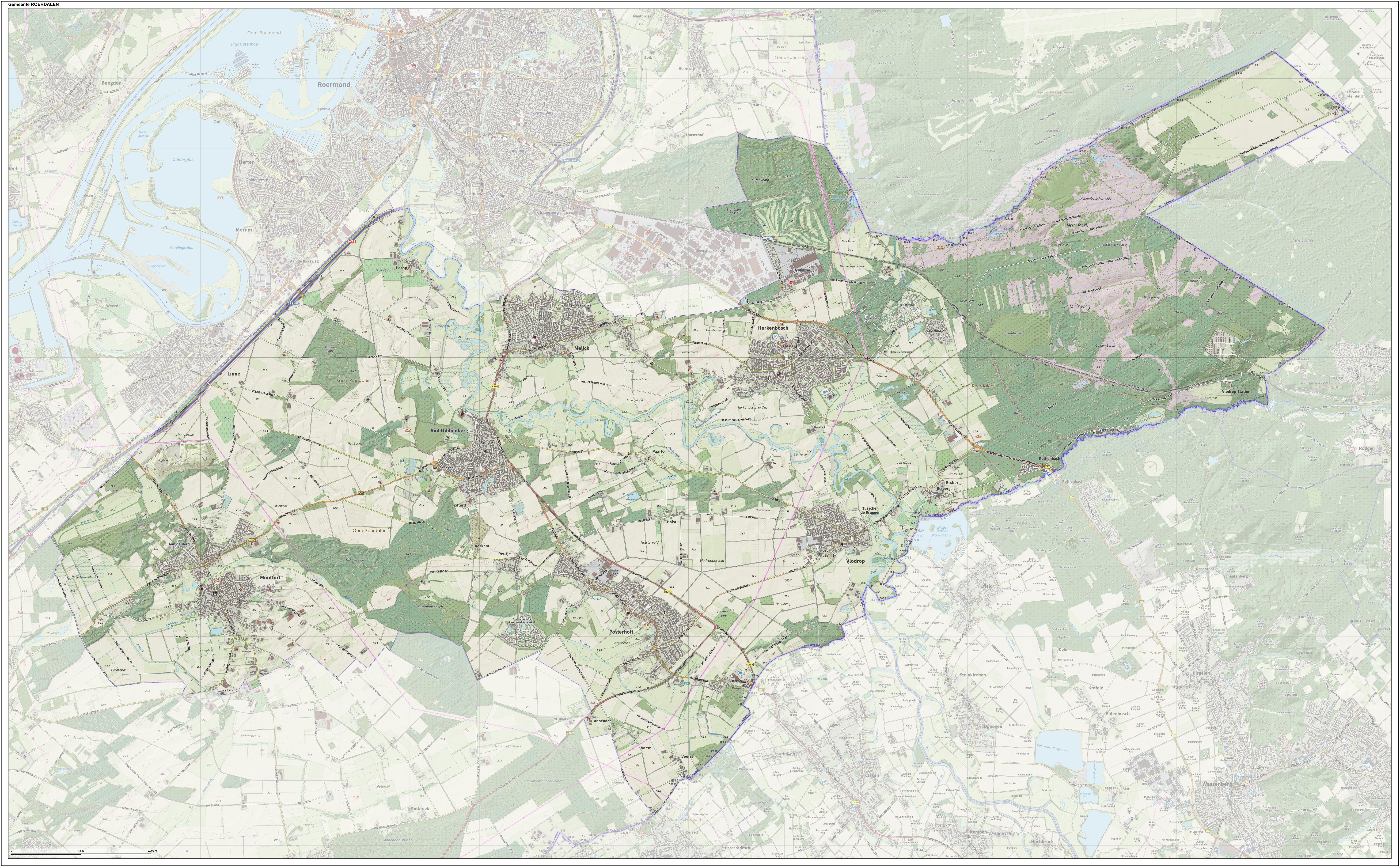 Topografische gemeentekaart. Resolutie: 400 pixels/km. Kaartbeeld samengesteld uit de open geodata van de Top10NL en Top25namen (Kadaster), Creative Commons-BY licentie. Gebouwvlakken uit open geodata BAG extract. Wegen uit de OpenStreetMap, OpenStreetMap community. Reliëfschaduw uit de Actuele Hoogtekaart AHN2. Samenstelling en kleurenschema: Jan-Willem van Aalst, met QGIS. Zie ook de Legenda.